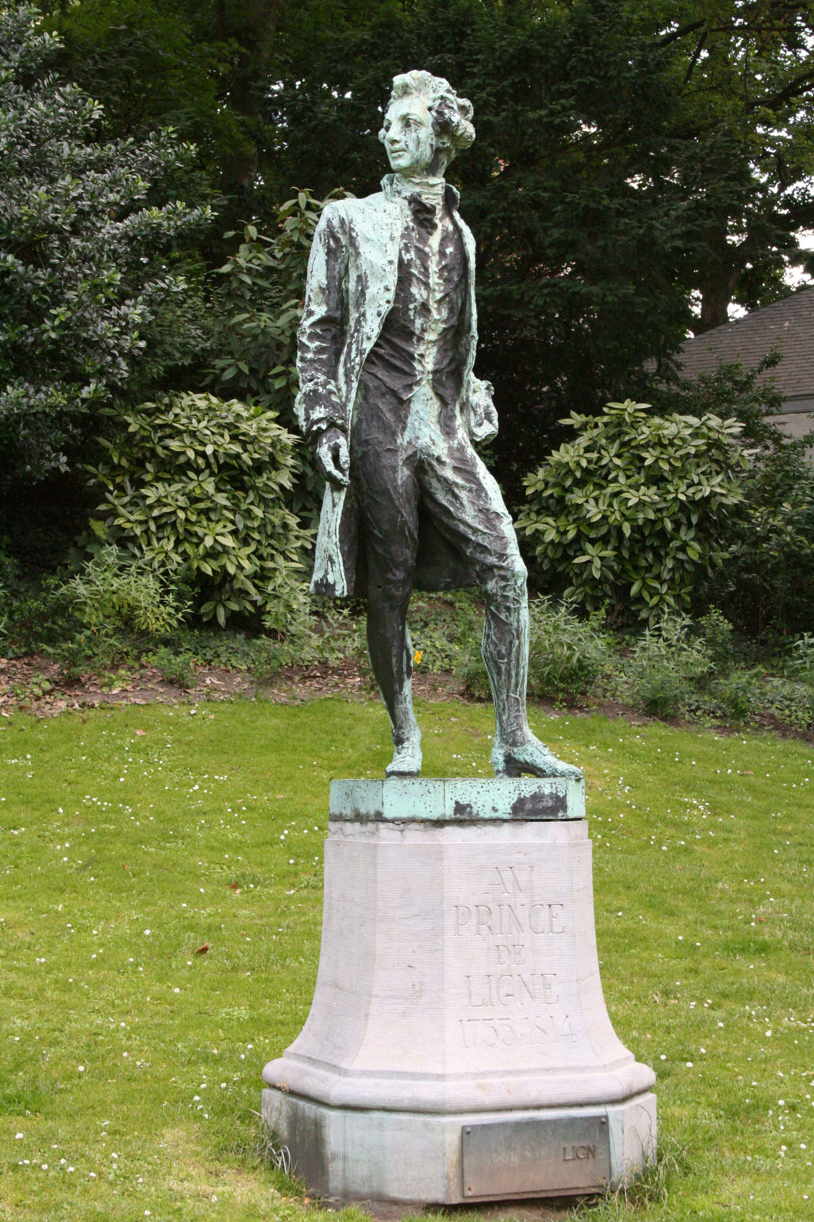 Parc d'Egmont, Bruxelles (Belgique). Statue du Prince de Ligne